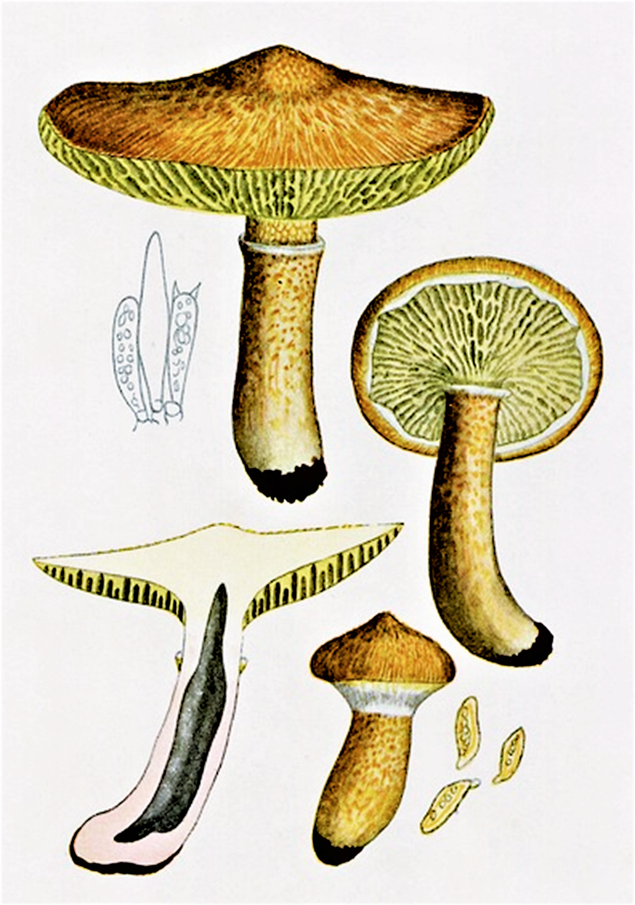 Giacomo Bresadola: Boletinus cavipes (Opat., 1836) Kalchbr. (1753), heute Suillus cavipes (Klotzsch, 1835) A.H.Sm. & Thiers (1964)